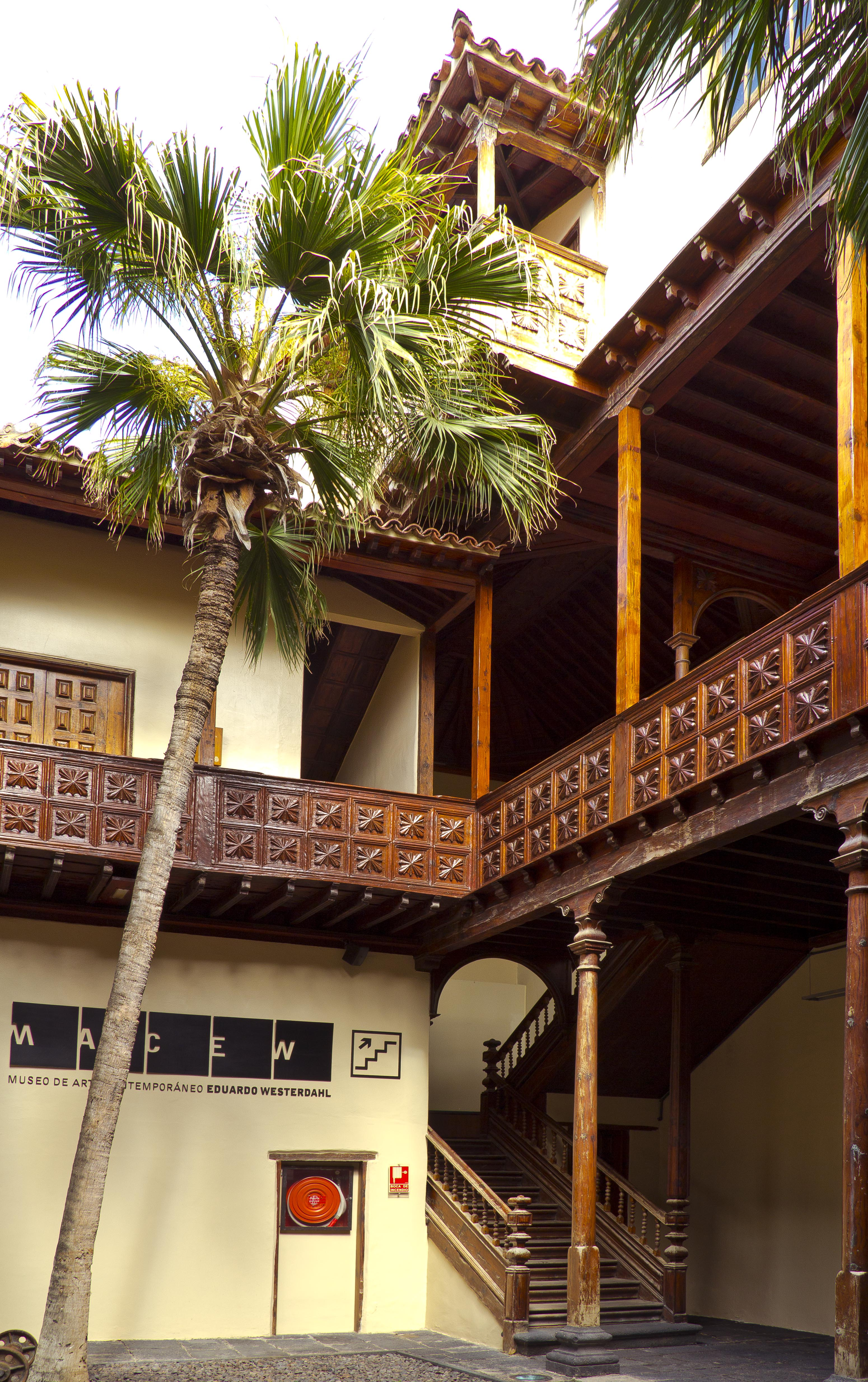 Casa de la Real Aduana, Aufgang zum Museo de Arte Contemporáneo Eduardo Westerdahl in Puerto de la Cruz, Teneriffa, Spanien